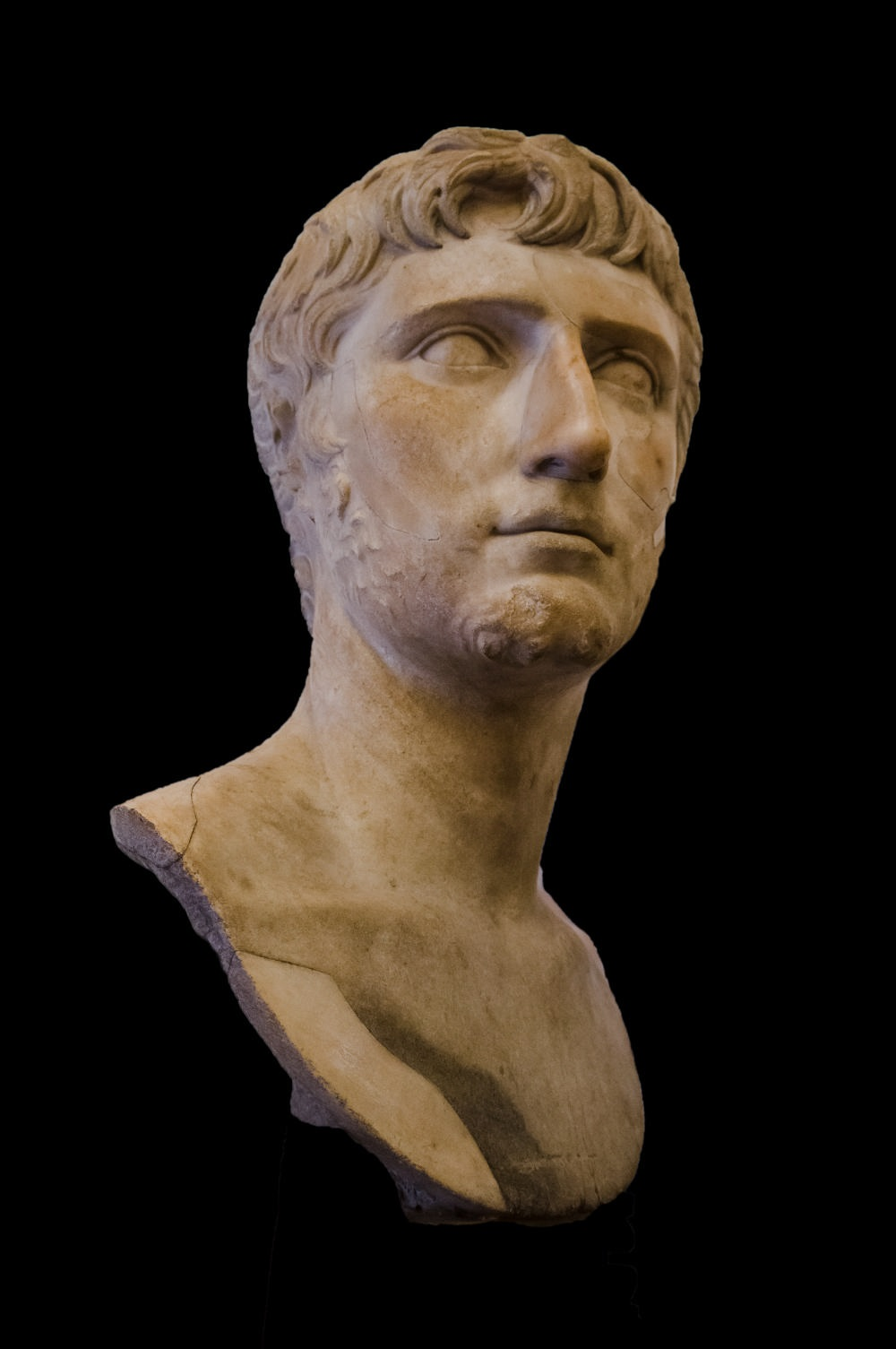 Ritratto di Gaio Cesare adulto, Roma Fondazione Sorgente Group